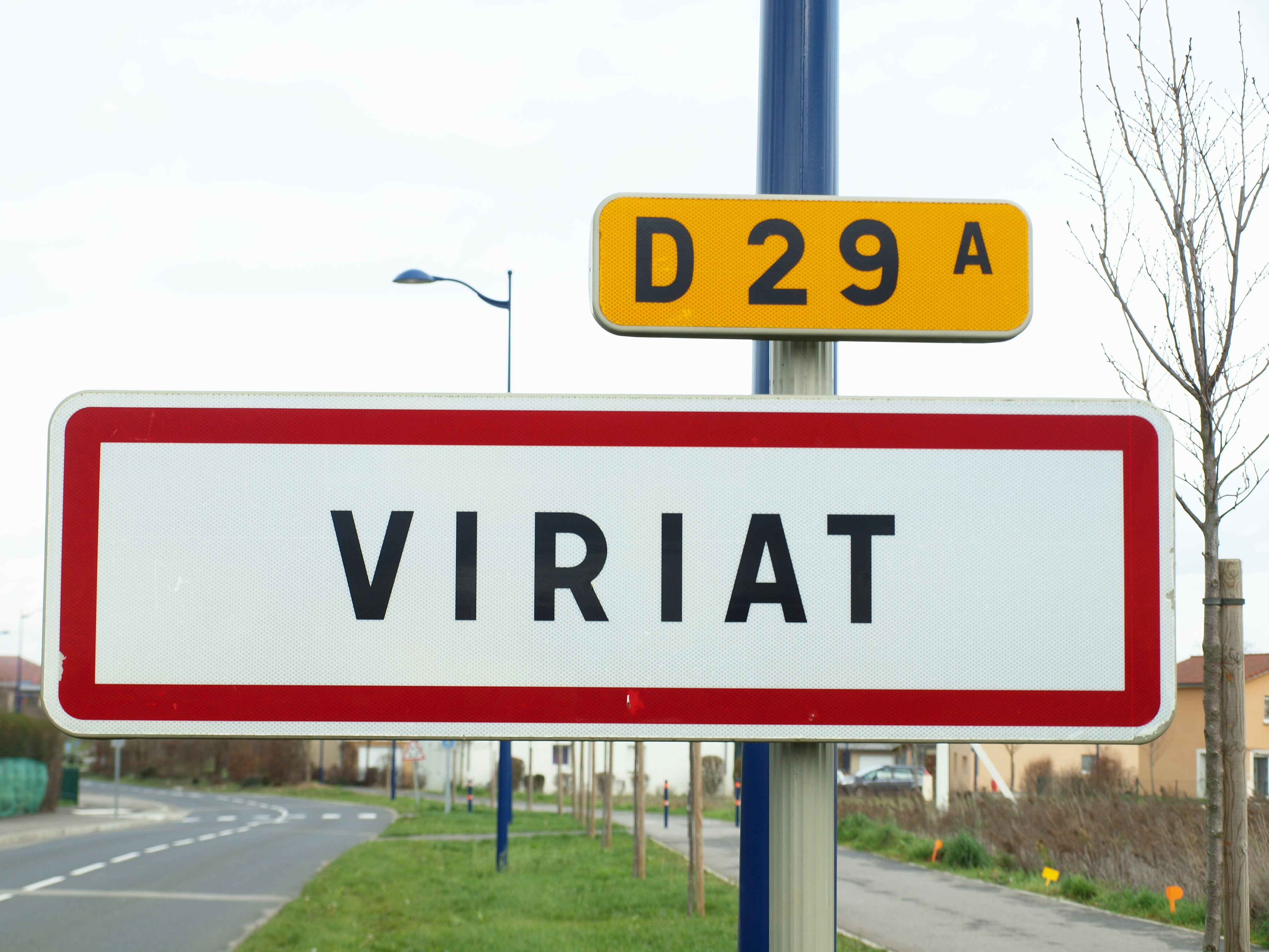 Viriat (Ain, France)